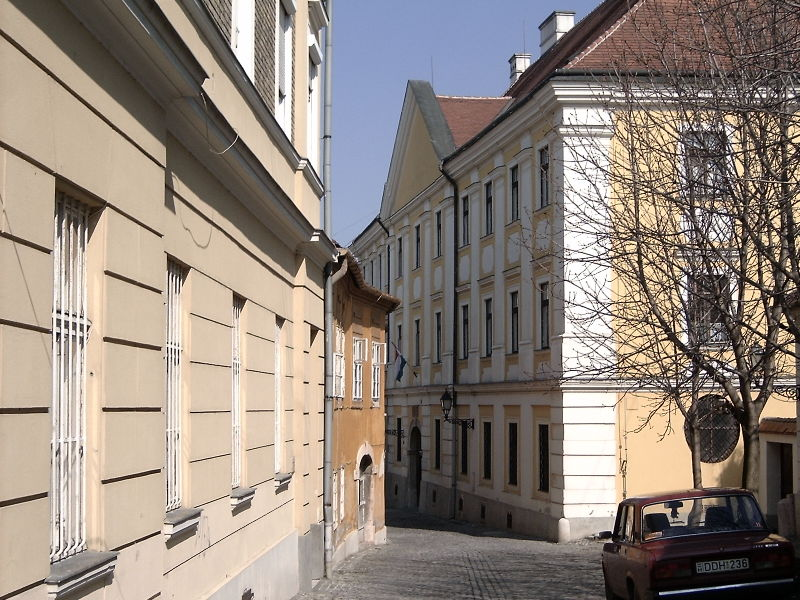 Diákotthon és könyvtár, volt papnevelde. ID 4267. Elpusztult, 17. sz. végi épületből újjáépítve barokk stílusban 1764-1768 között. A könyvtár nagyterme 1870-ből. - Győr, Káptalandomb 26. This is a photo of a monument in Hungary, Identifier: 4267 Object location47° 41′ 19.98″ N, 17° 37′ 56.64″ E